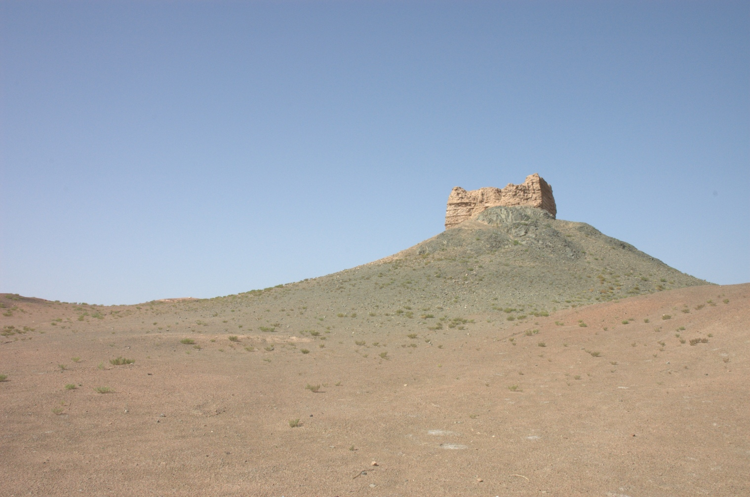 阳关烽火台遗址